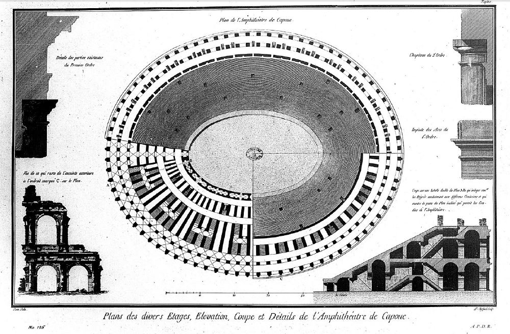 Plan général de l'amphithéâtre de Capoue